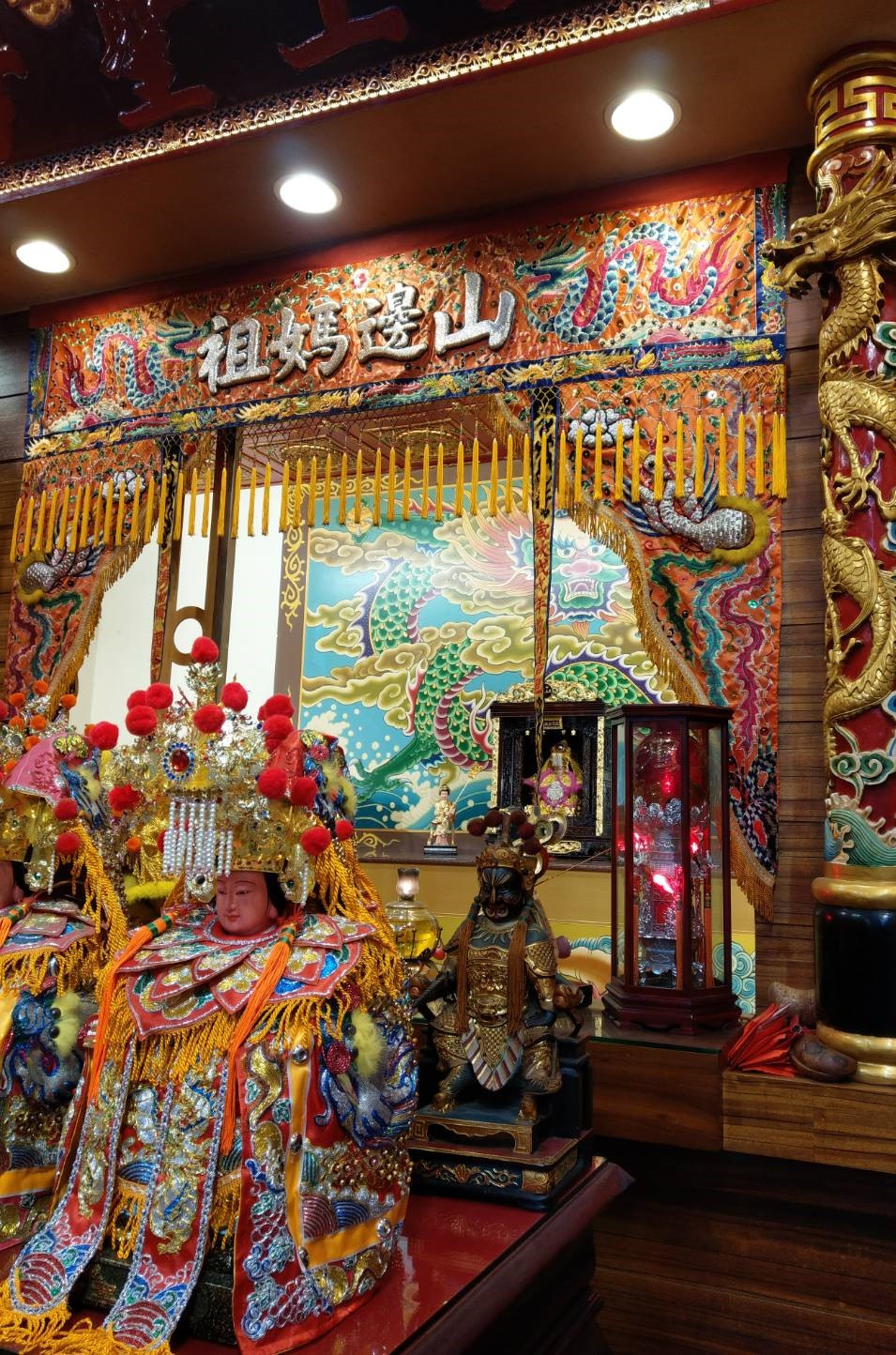 山邊媽祖正殿